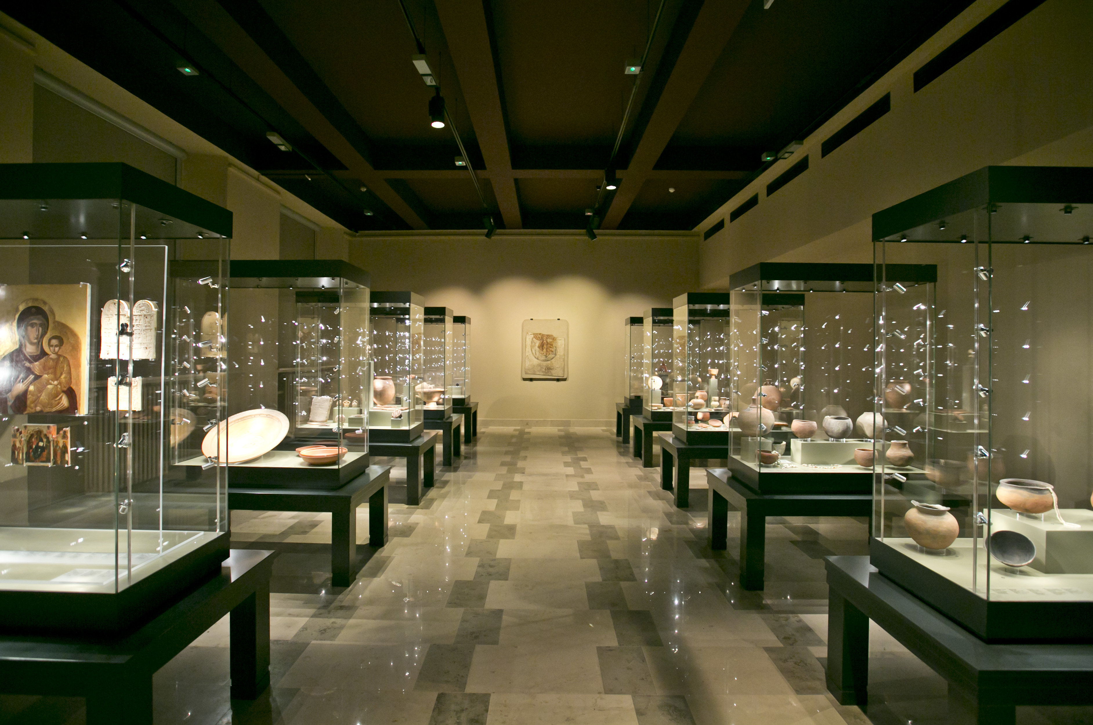 Muzeum Narodowe w Warszawie, Galeria Faras